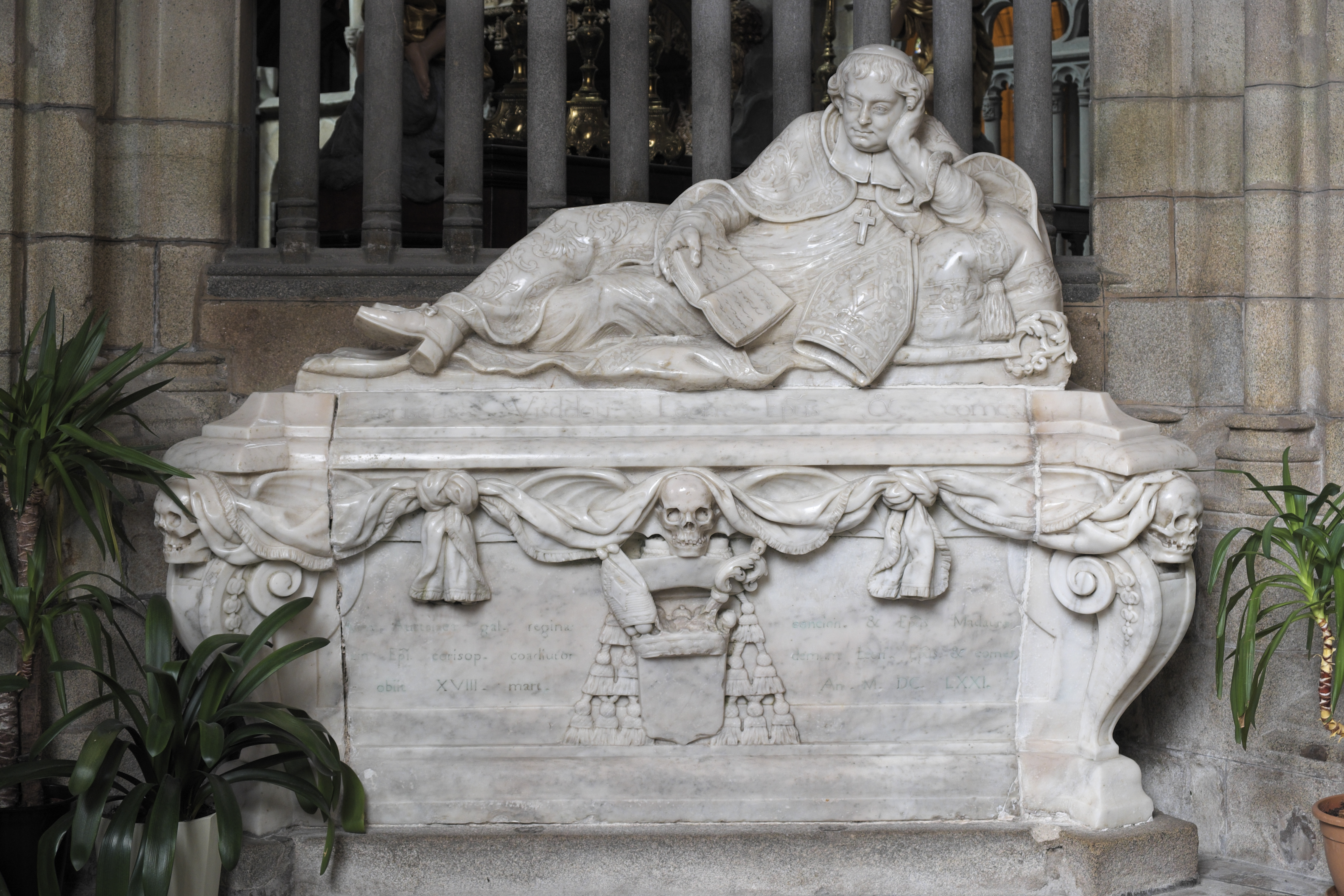 Ehemalige Kathedrale Saint-Paul-Aurélien in Saint-Pol-de-Léon im Département Finistère (Region Bretagne/Frankreich), Grab des Bischofs François de Visdelou († 1668)